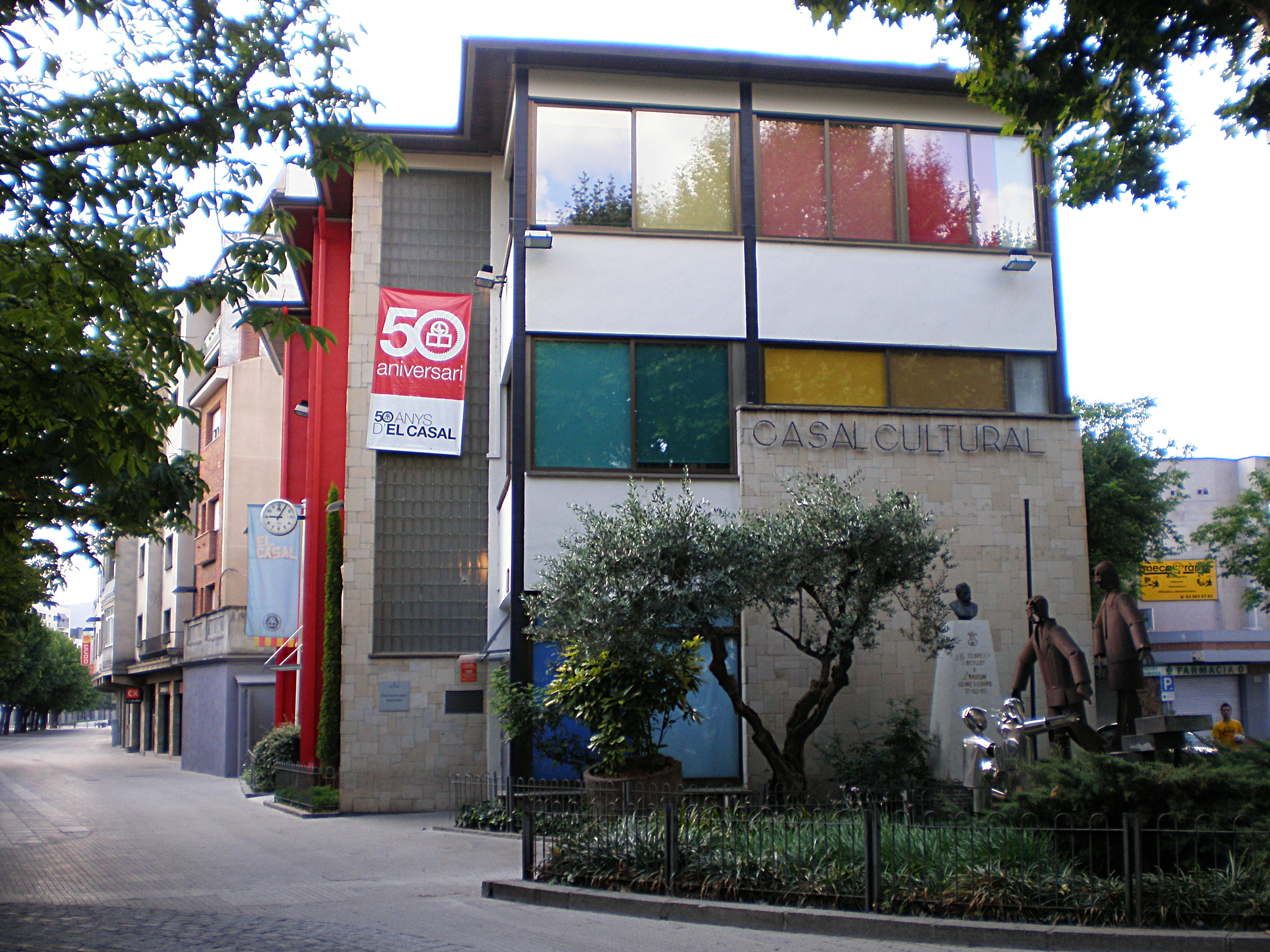 Mollet del Vallès: Casal Cultural a la Rambla de Balmes.